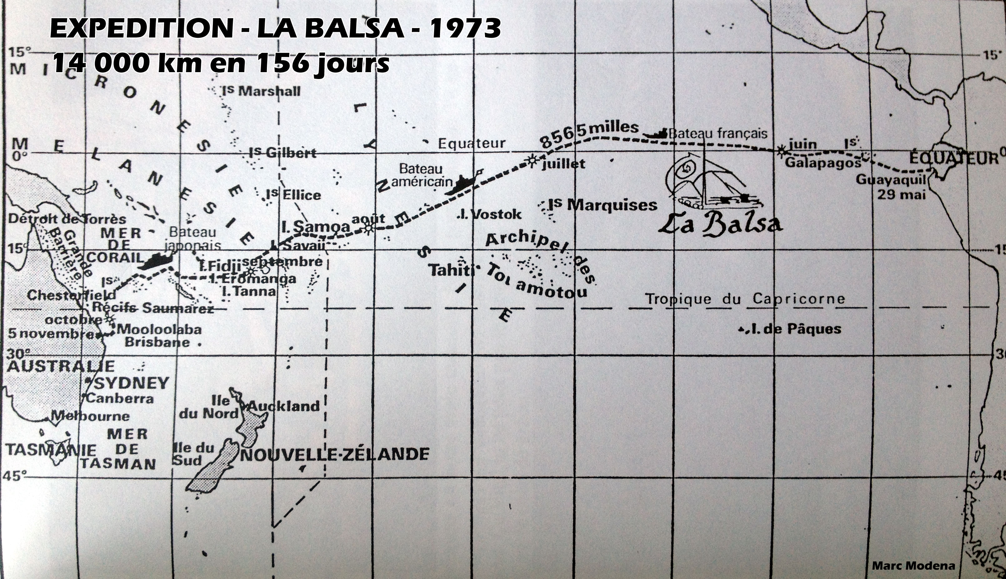 Carte Navigation expédition la balsa - Marc Modena